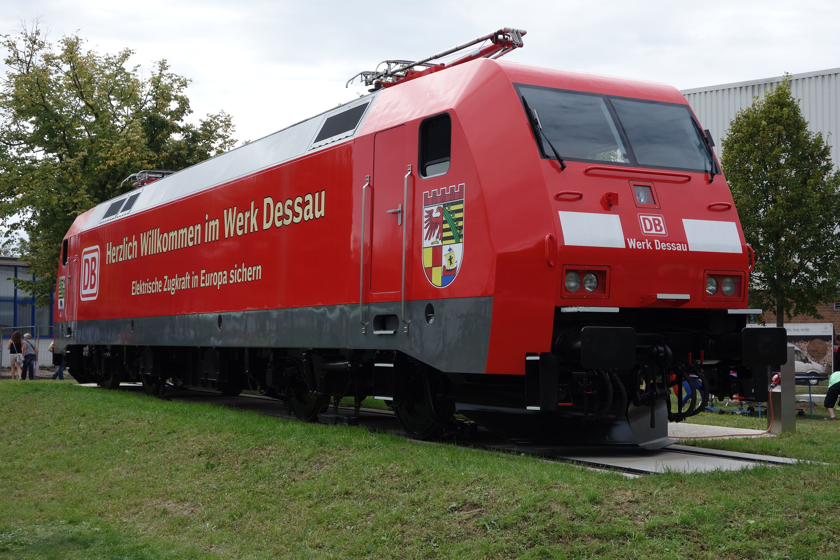 DB Fahrzeuginstandhaltung Werk Dessau, Tag der offenen Tür, Repräsentations-Lok (ehem. Unfall-Lok 152 040) mit einer Ausstellung zur Geschichte des Werks